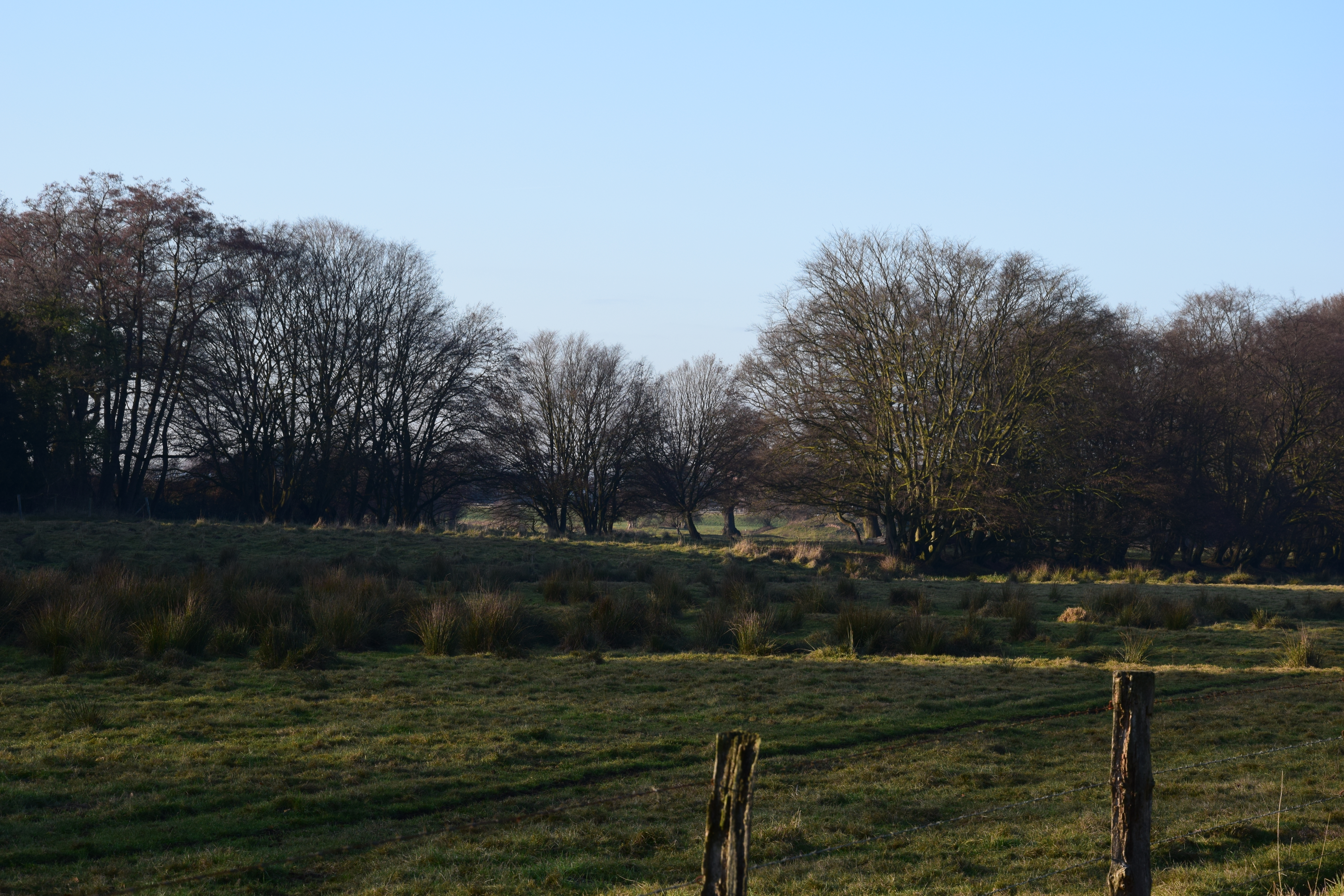 Naturschutzgebiet Mühlenbruch KLE 017 (Goch), Blickrichtung Niederlande